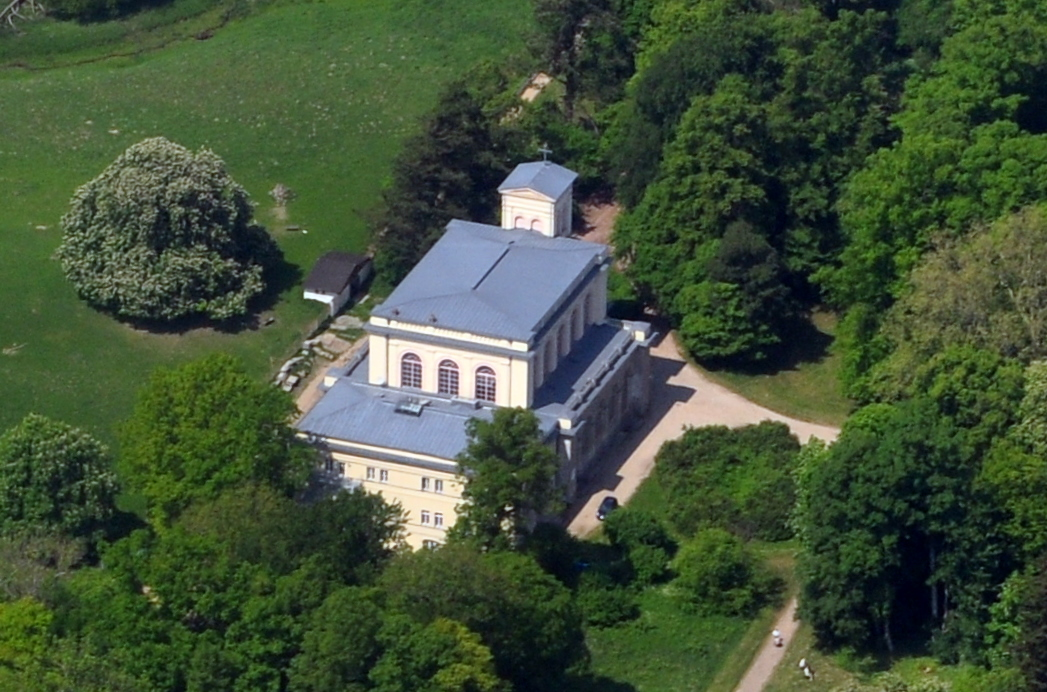 Die Bilder wurden von mir während eines einstündigen Rundflugs ab Flugplatz Güttin am 21. Mai 2011 aufgenommen. Die Bildbeschreibung steht im Dateinamen. Aufgenommen mit einer Nikon D5000 durch das Seitenfenster des Flugzeugs.